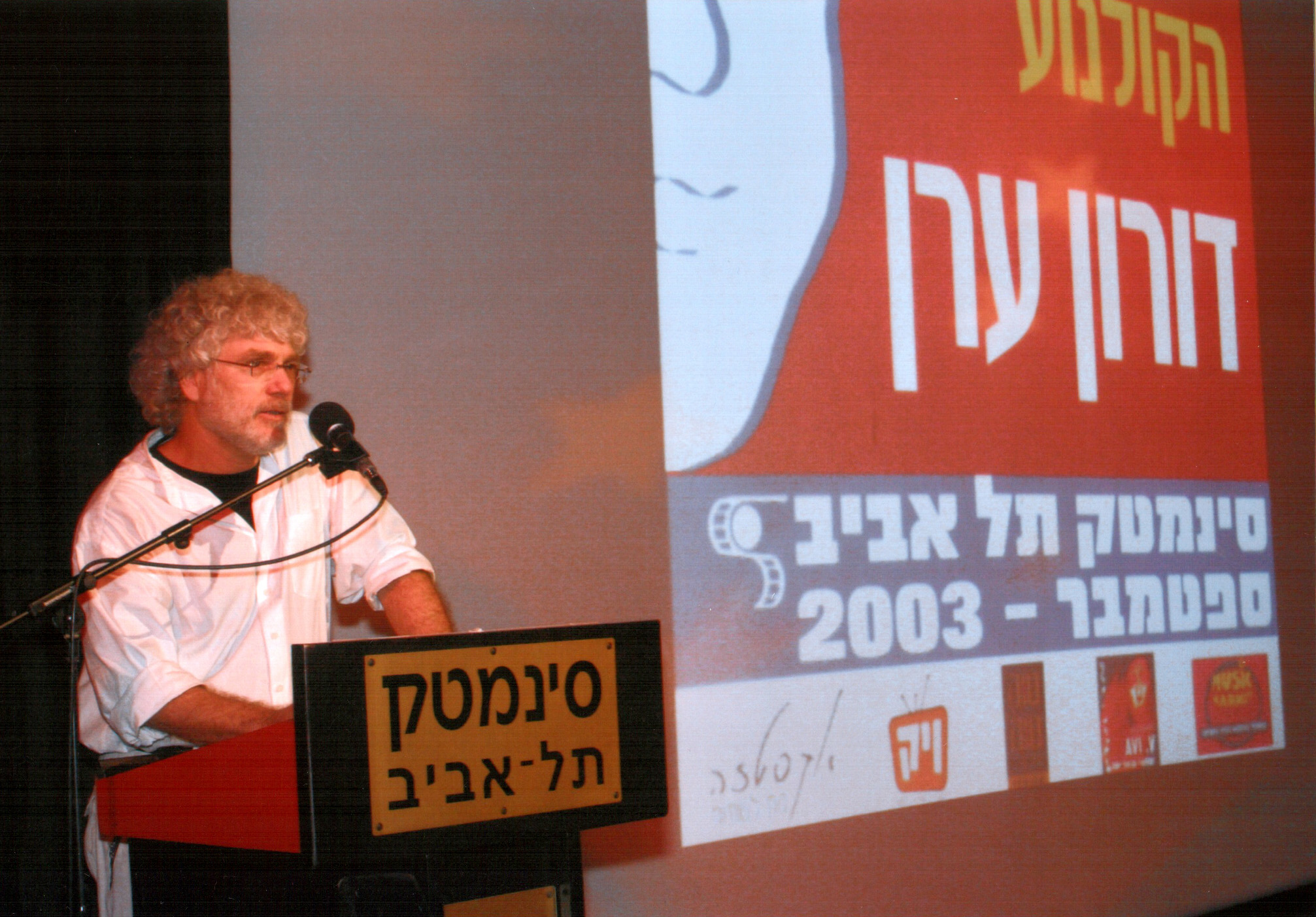 דורון ערן על הפודיום בסינמטק תל אביב, במהלך ערב הוקרה